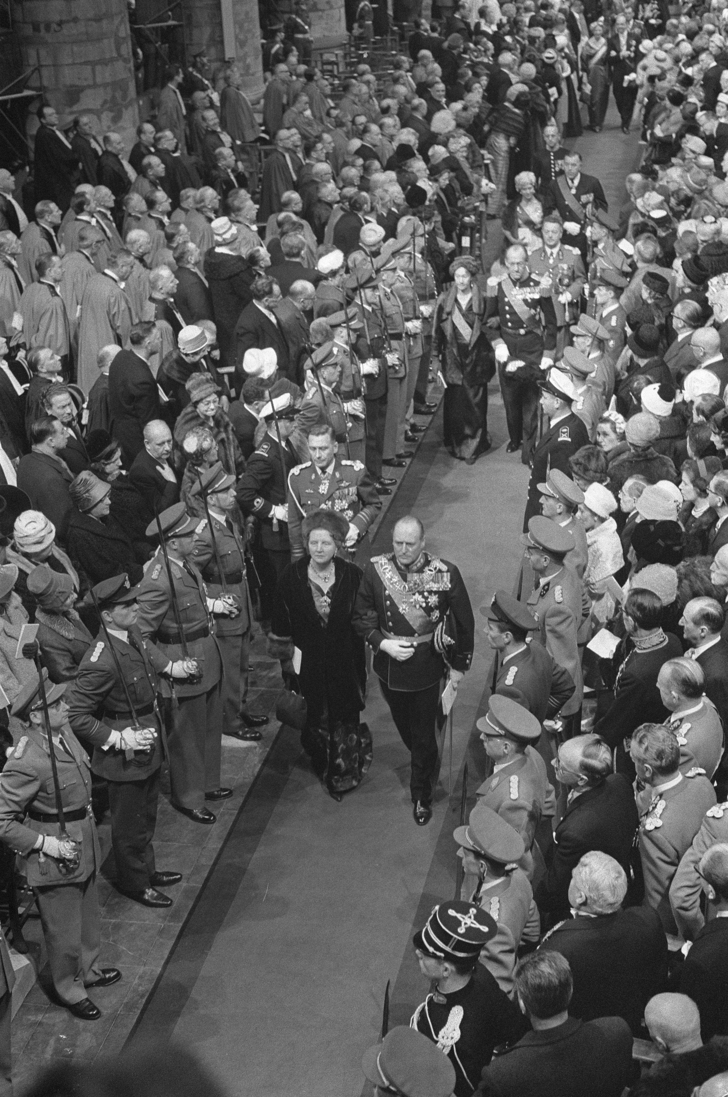 Collectie / Archief : Fotocollectie Anefo Reportage / Serie : [ onbekend ] Beschrijving : Vorstelijk huwelijk te Brussel, Koningin Juliana verlaat aan de arm van Koning Olav de kerk Datum : 15 december 1960 Locatie : Brussel Trefwoorden : Vorstelijk, huwelijken, kerken Persoonsnaam : Juliana, koningin, Koning Olav Fotograaf : Pot, Harry / Anefo Auteursrechthebbende : Nationaal Archief Materiaalsoort : Negatief (zwart/wit) Nummer archiefinventaris : bekijk toegang 2.24.01.05 Bestanddeelnummer : 911-8799